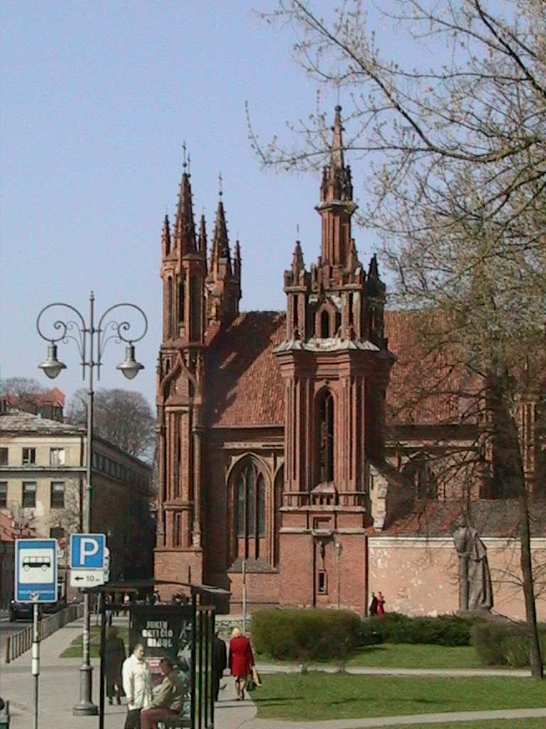 Saint Ann's church in Vilnius